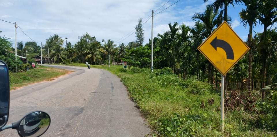 မြန်မာဘာသာ: ကရသူရိ